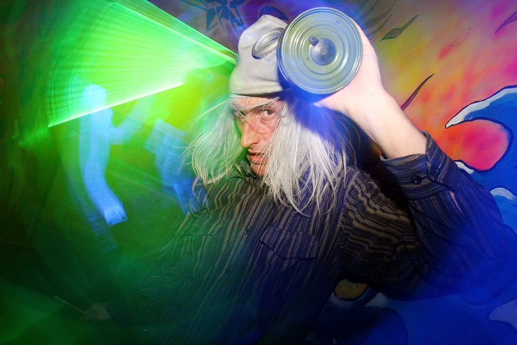 Onu Bella